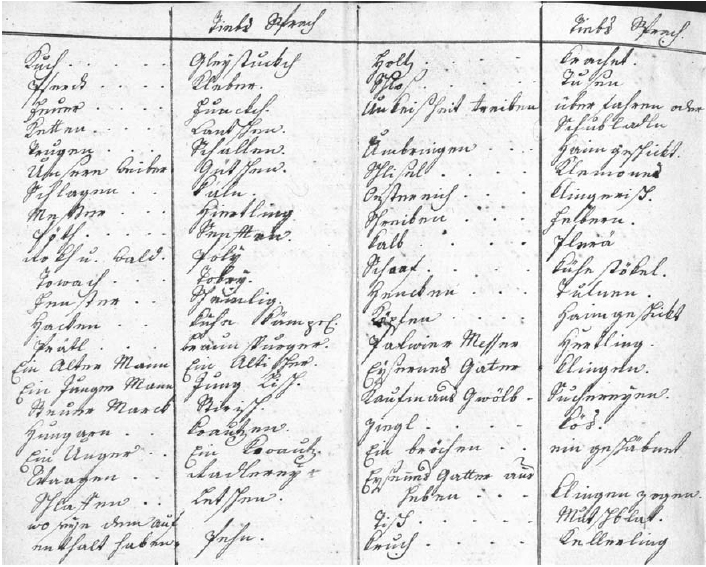 Wörterverzeichnis der Diebessprache aus Pinkafeld, Originalhandschrift (oberer Teil der zweiten Seite)